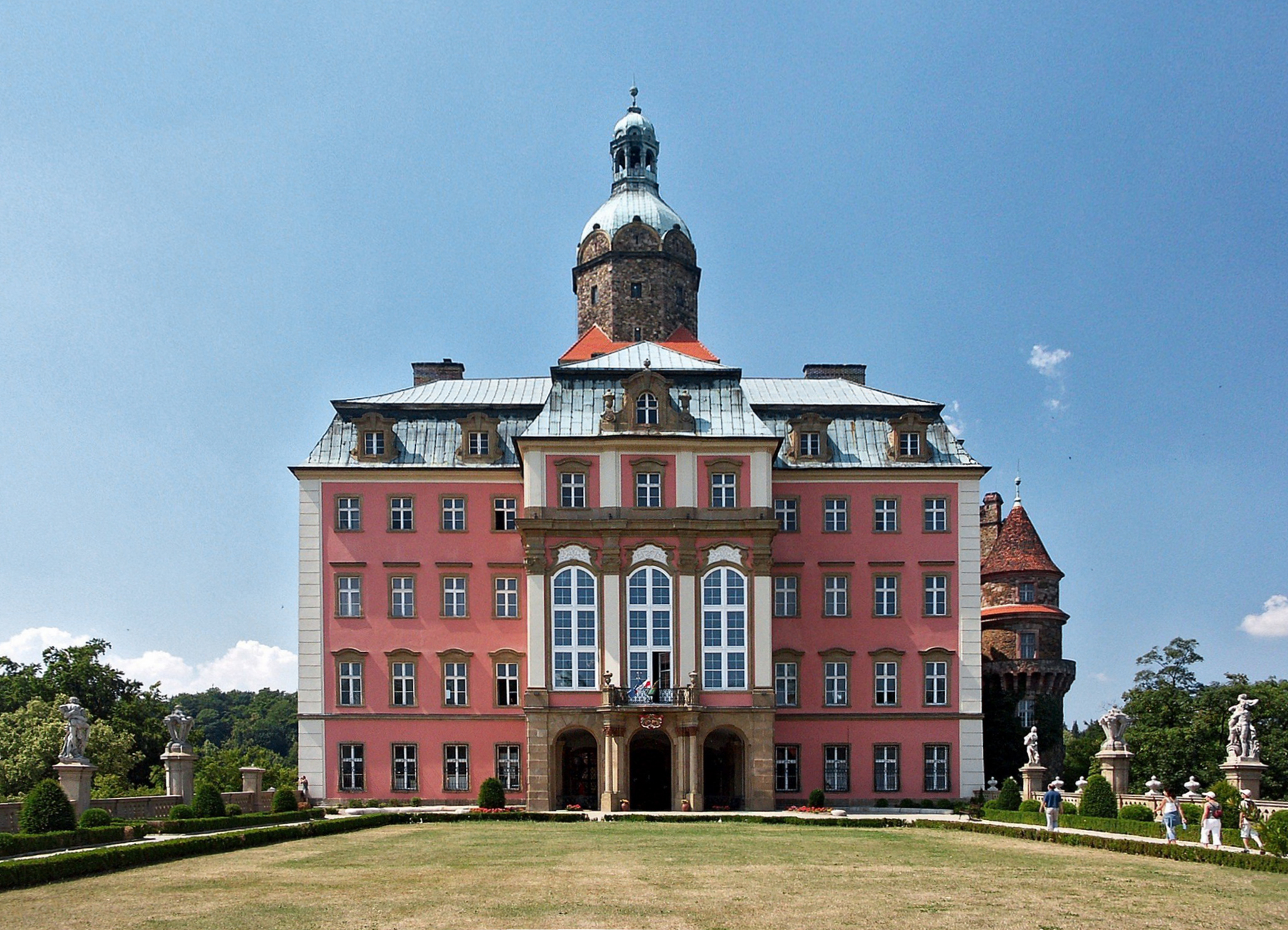 Author: Dariusz Cierpiał (